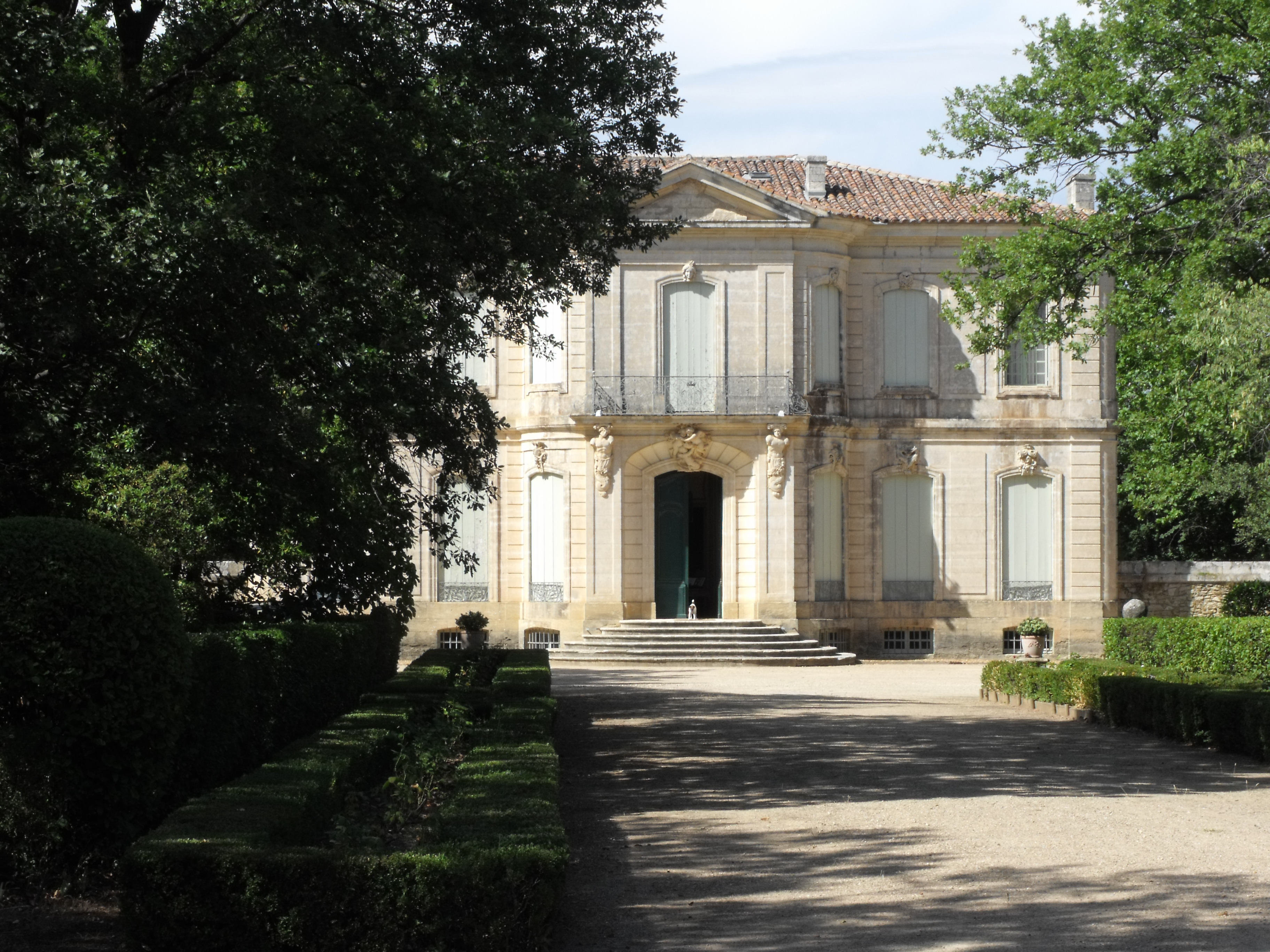 Château de l'Engarran, Lavérune